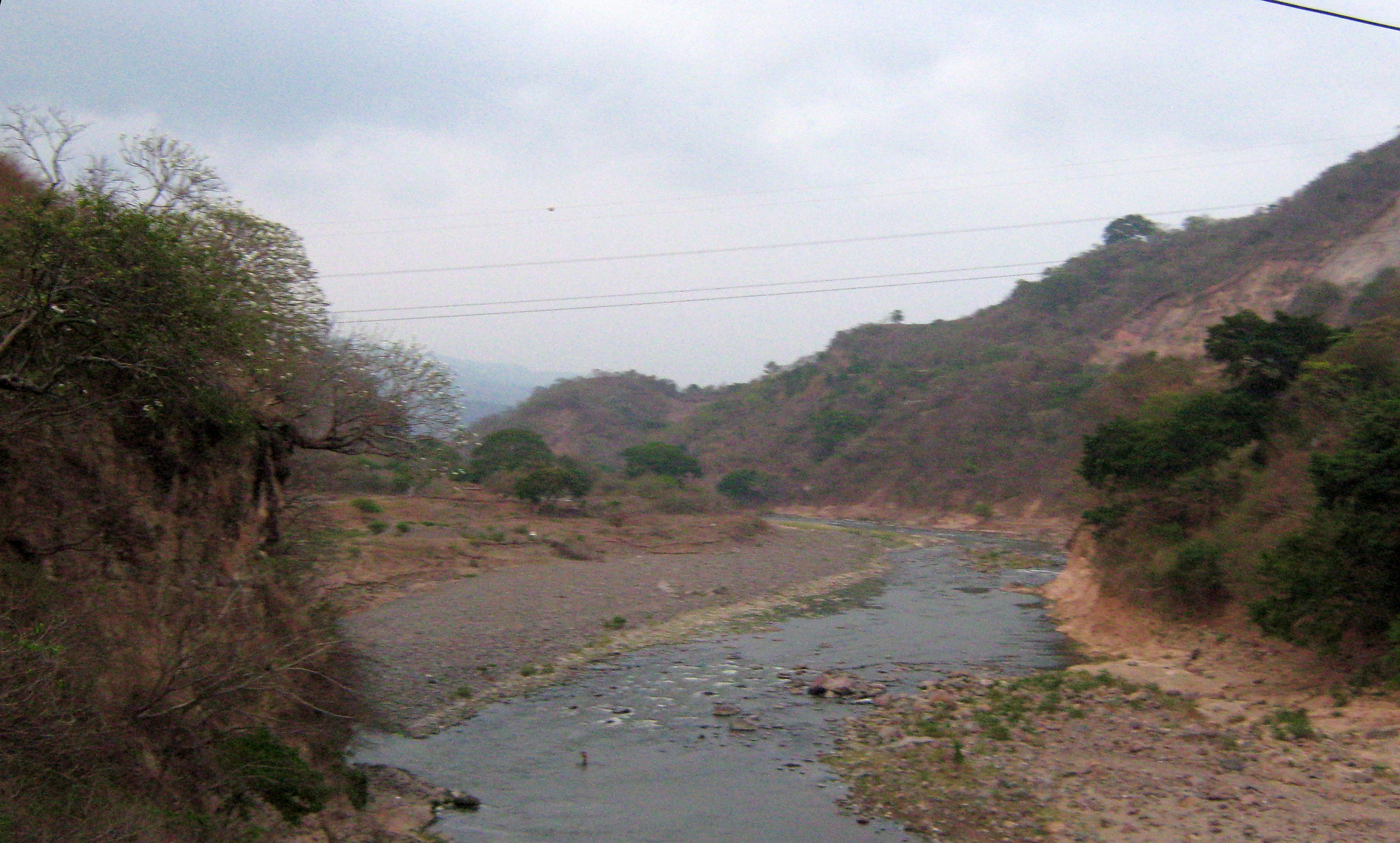 Fotografía del Río Paz, que divide Guatemala con El Salvador.